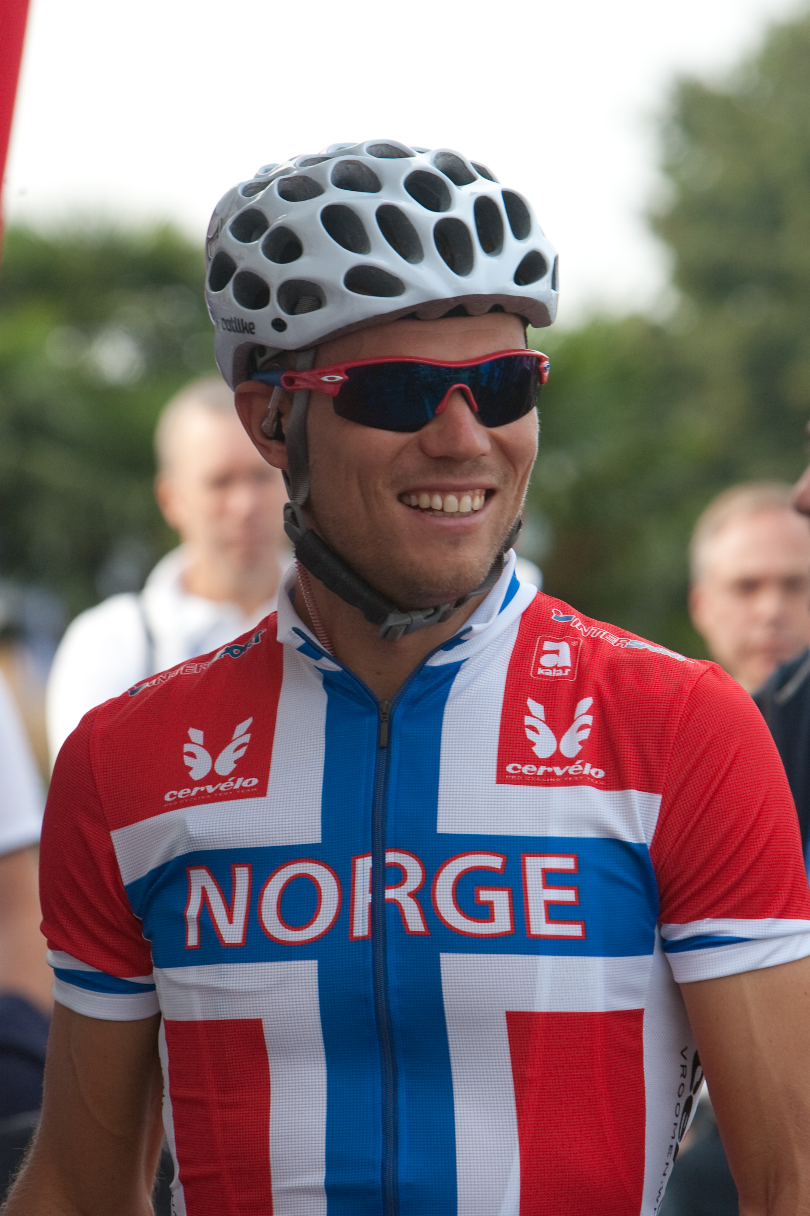 Thor Hushovd aux championnats du monde de Mendrisio en 2009.